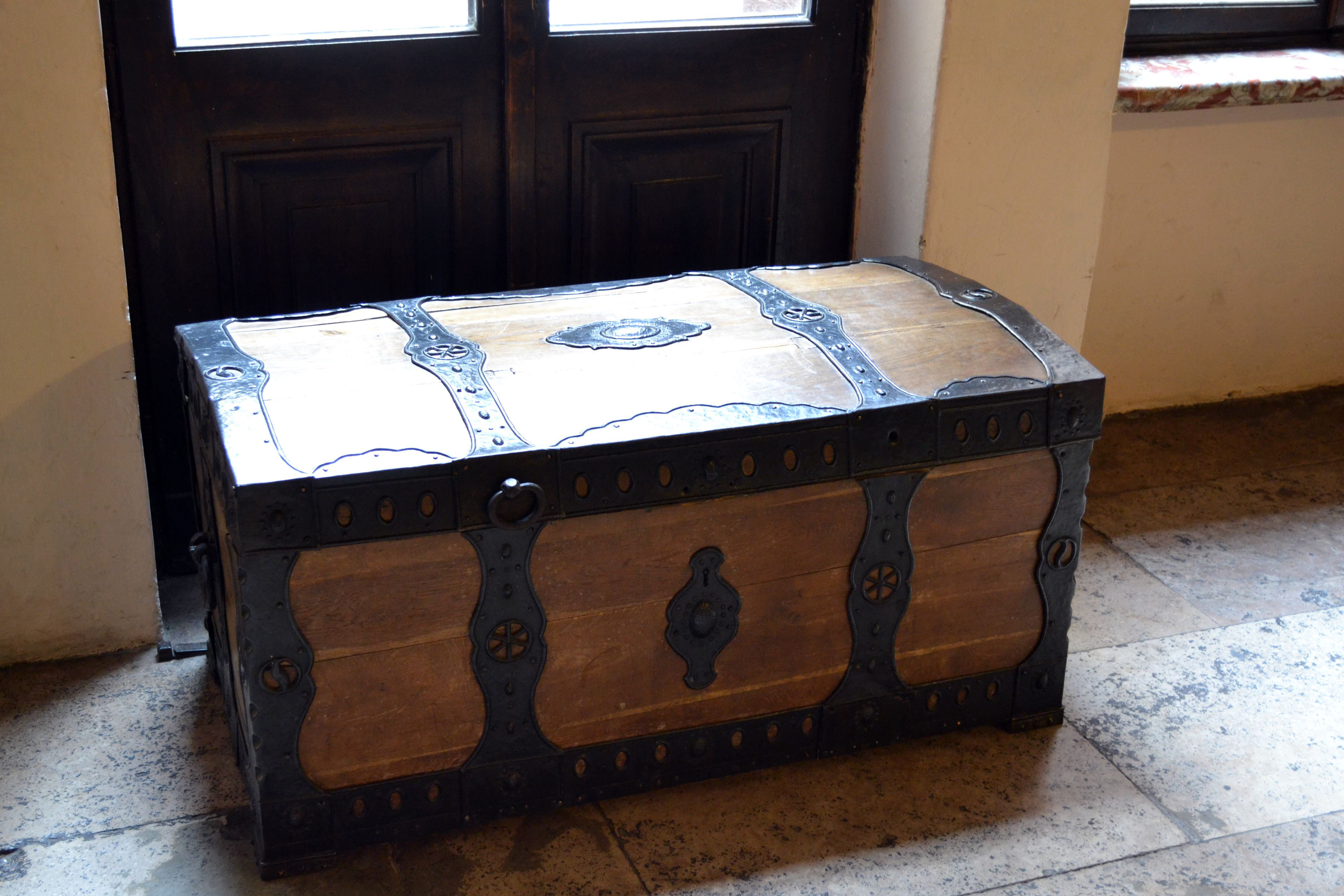 Wałbrzych, zamek